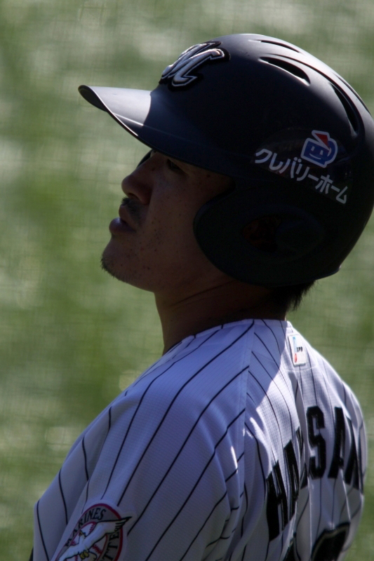 日本プロ野球 千葉ロッテマリーンズ 早坂圭介 選手